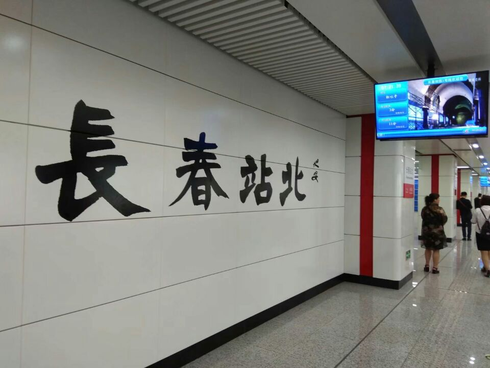 长春地铁一号线长春站北大字壁